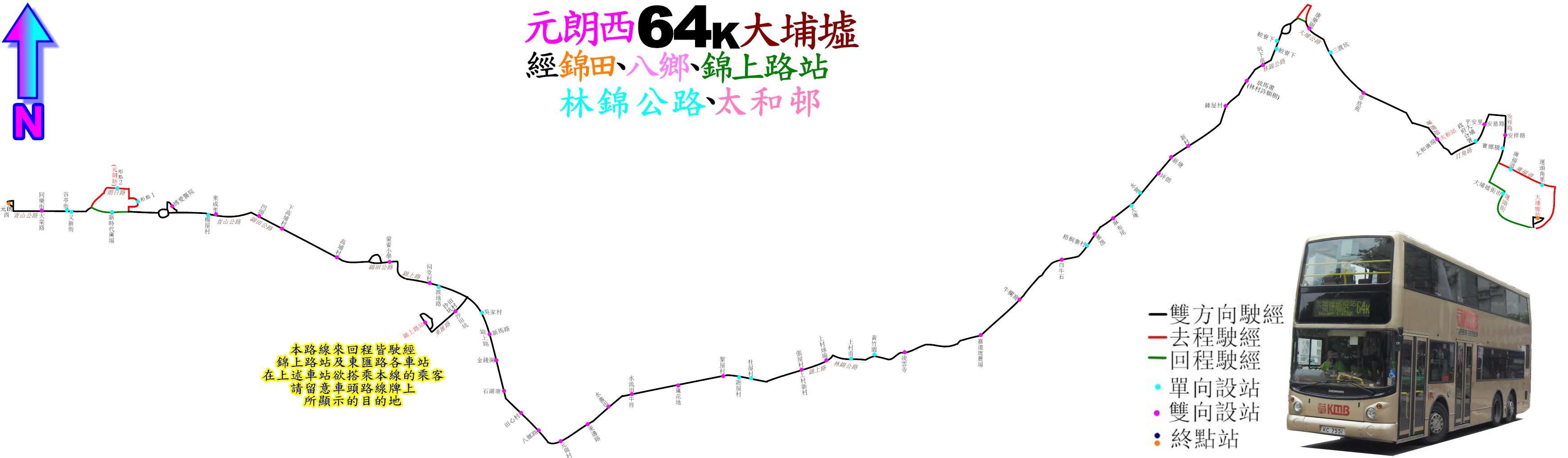 中文（香港）: 九巴64K線的走線圖